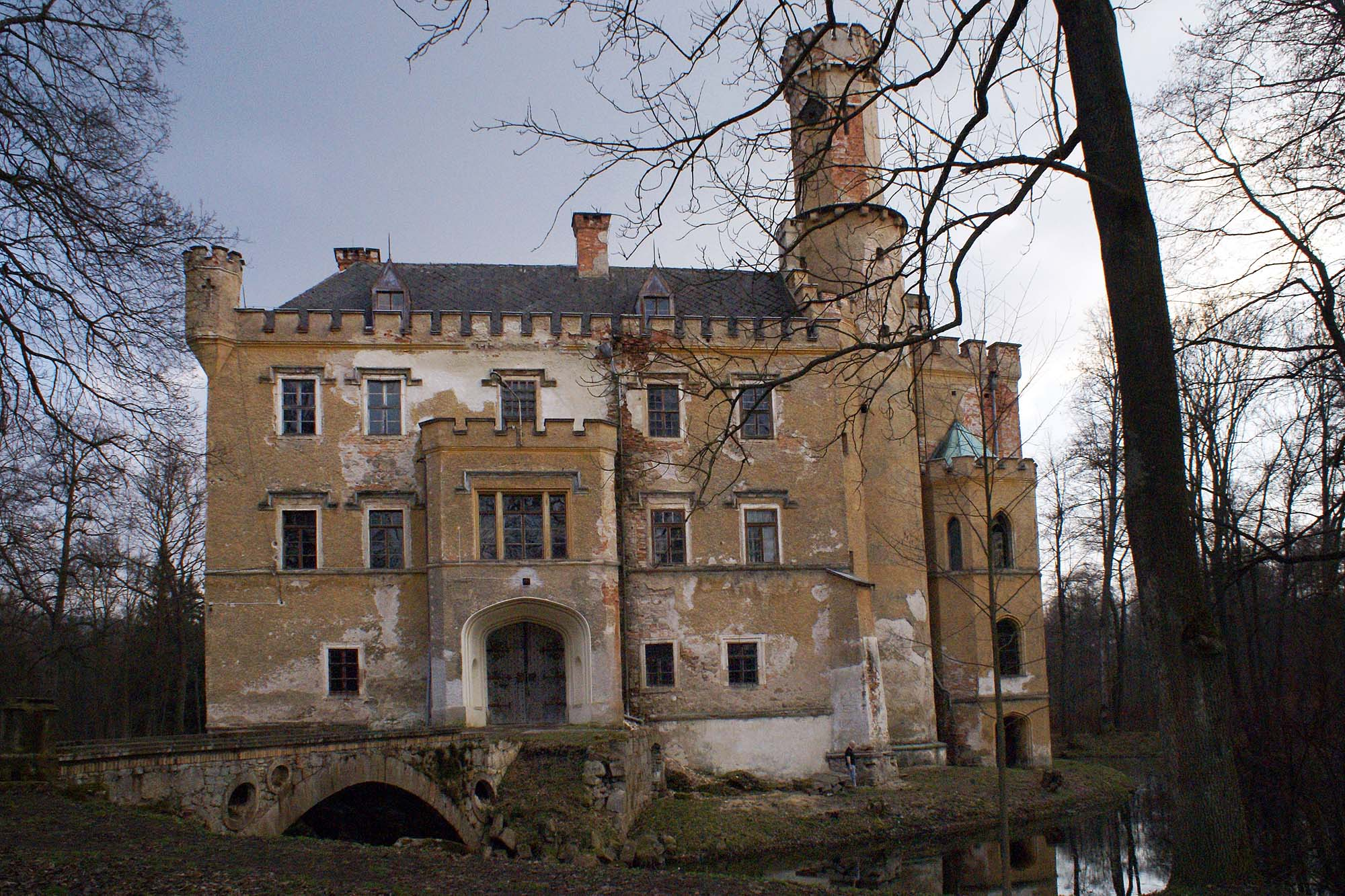 Karpniki, pałac, 1 poł. XVII, 1838-1846